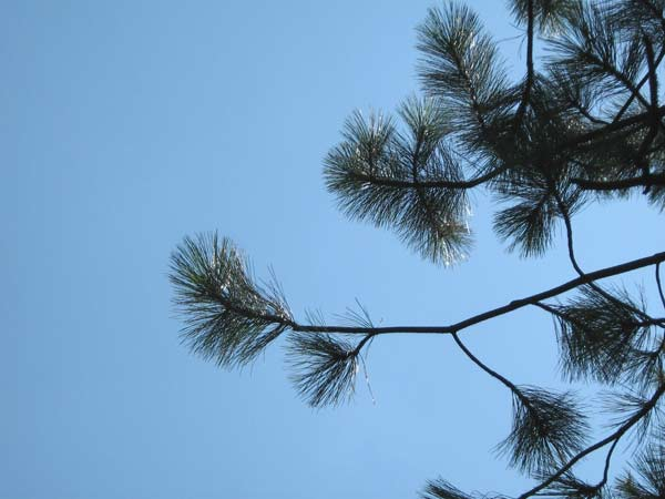 Краснокутський_дендропарк: Краснокутський_дендропарк_кримська сосна